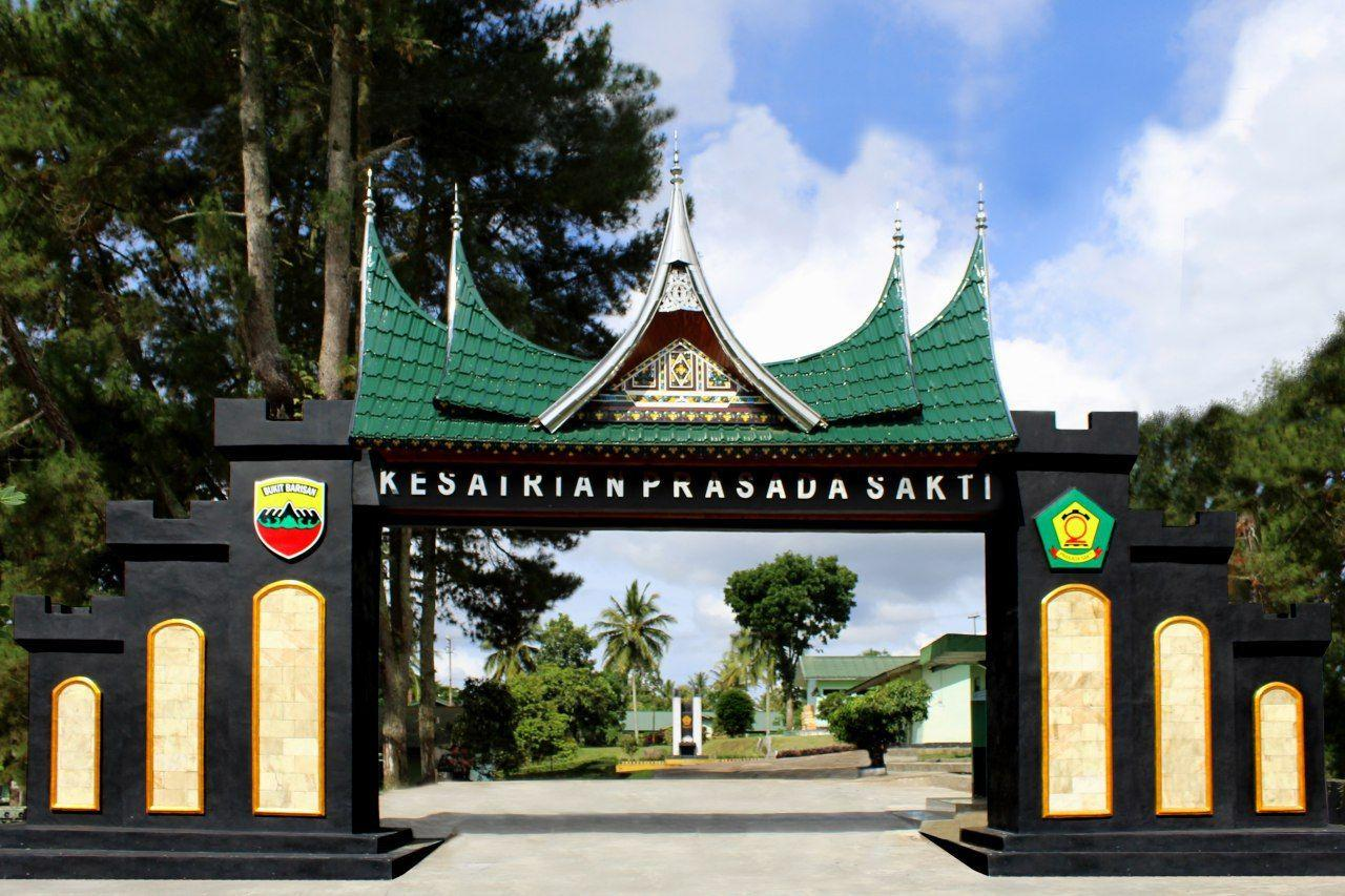 GERBANG DENZIPUR 2/PS